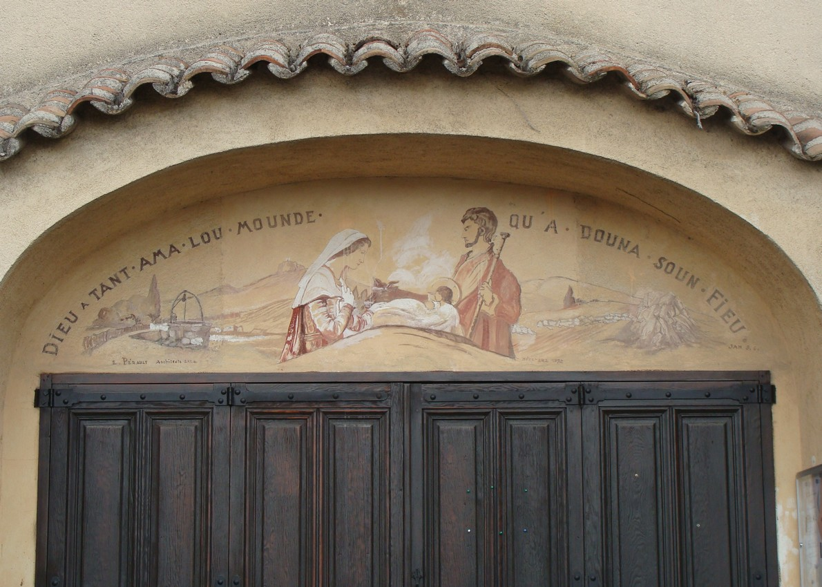 Le fronton de l'église de Belcodène. L'inscription, en provençal, signifie : "Dieu a tant aimé le monde qu'il a donné son fils".